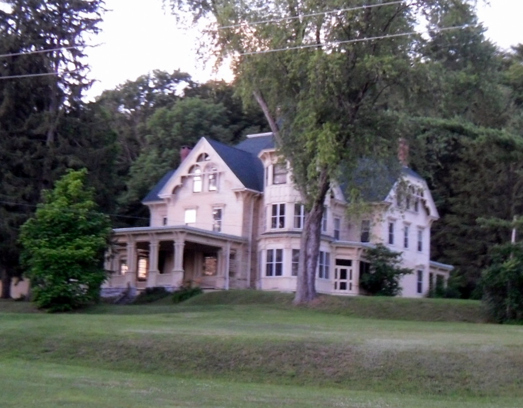 Dolgeville, New York